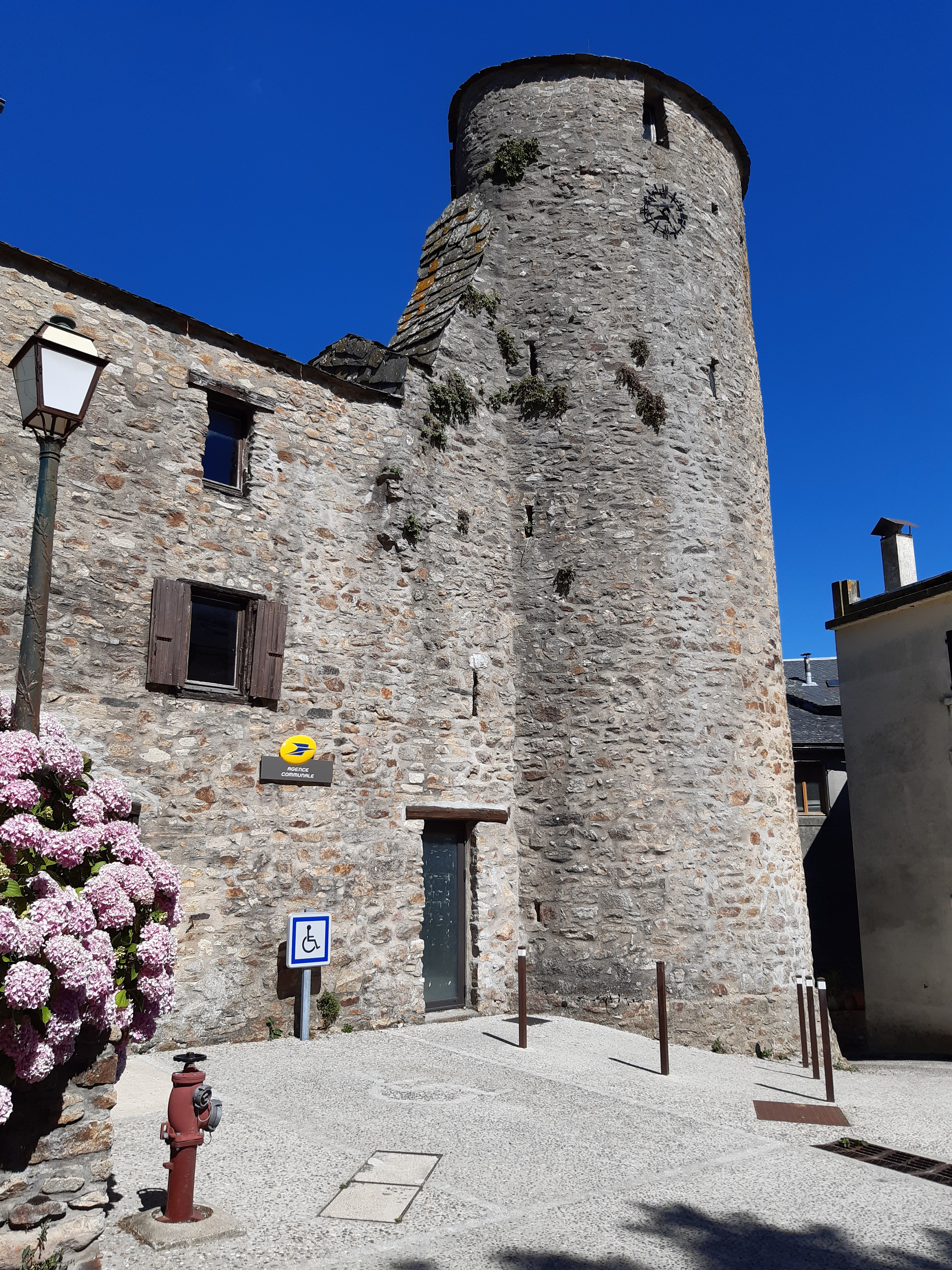 Vestige de l'ancien château de Fontiers-Cabardès.